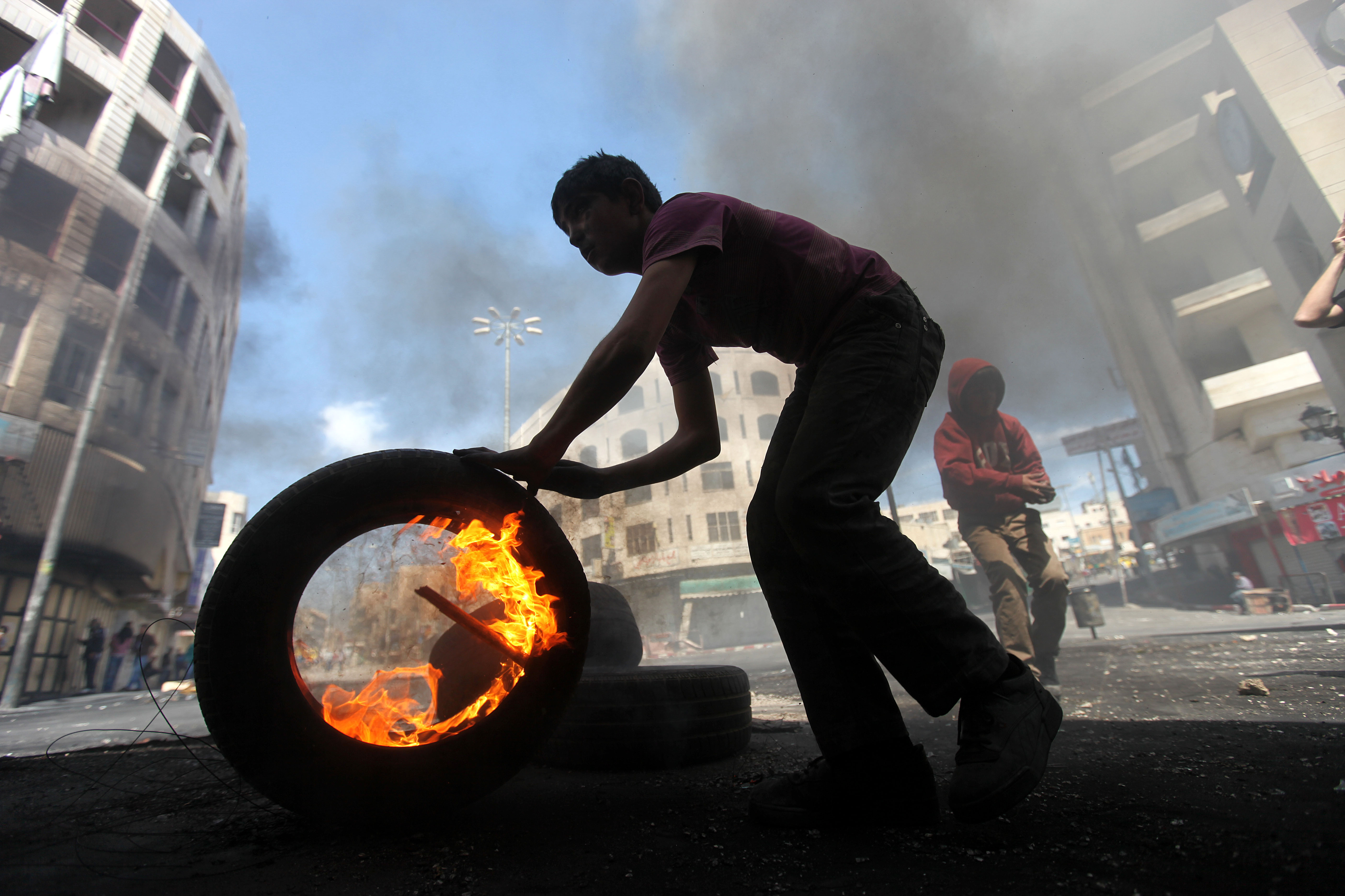 صورة تبيّن المواجهات بين الاحتلال الإسرائيلي والفلسطينين